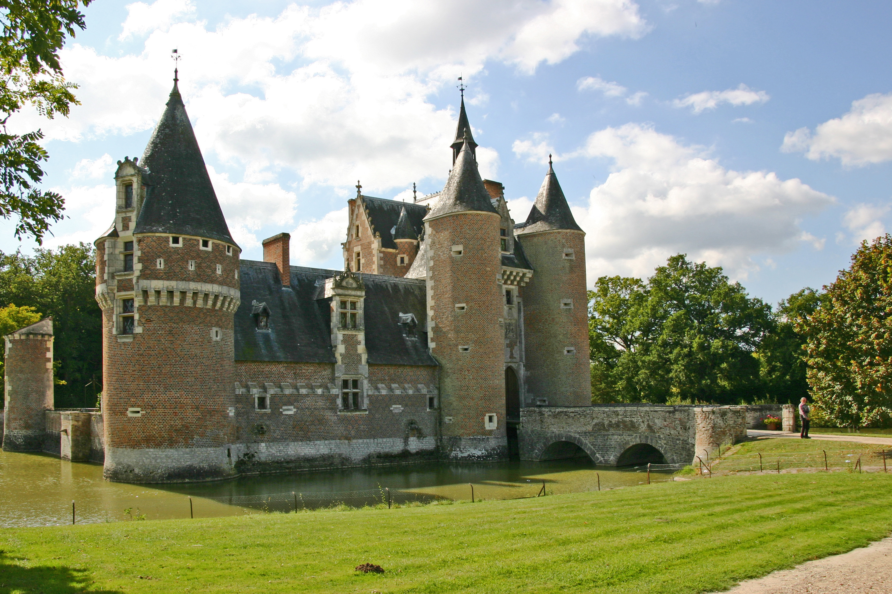 Schloss Le Moulin